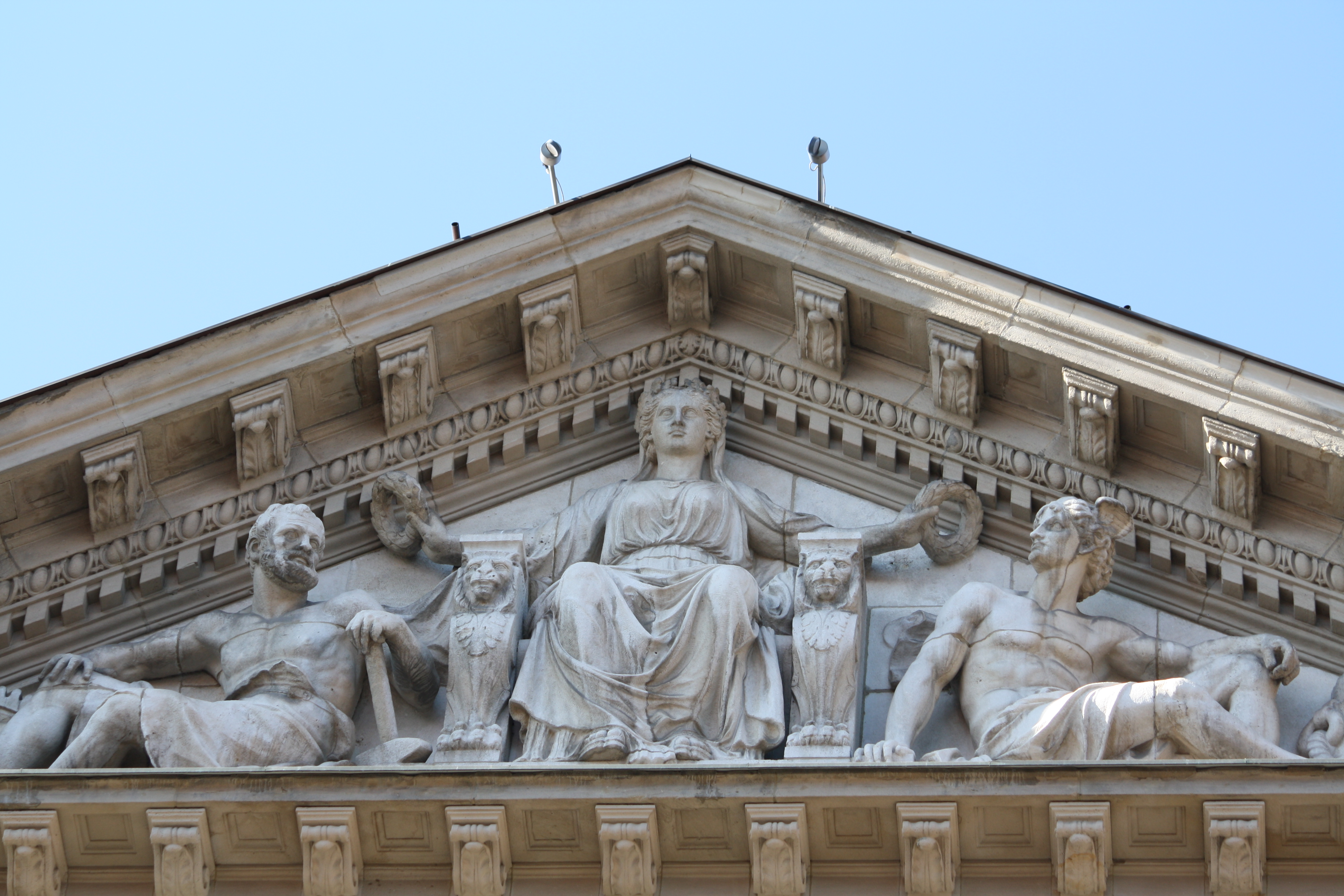 Kardinal-Faulhaber-Straße 1, München